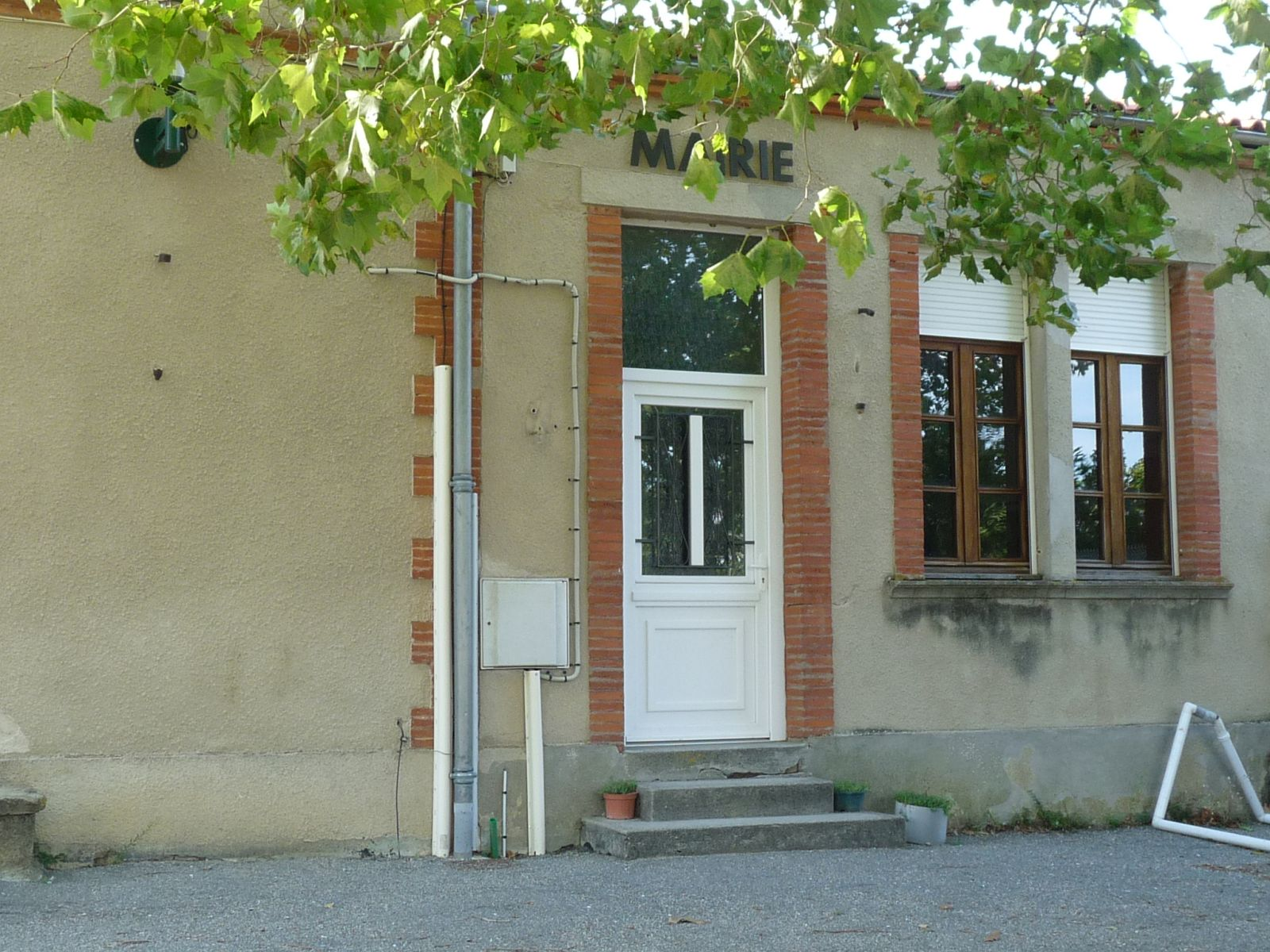 Mairie-école, Folcarde, Haute-Garonne, France